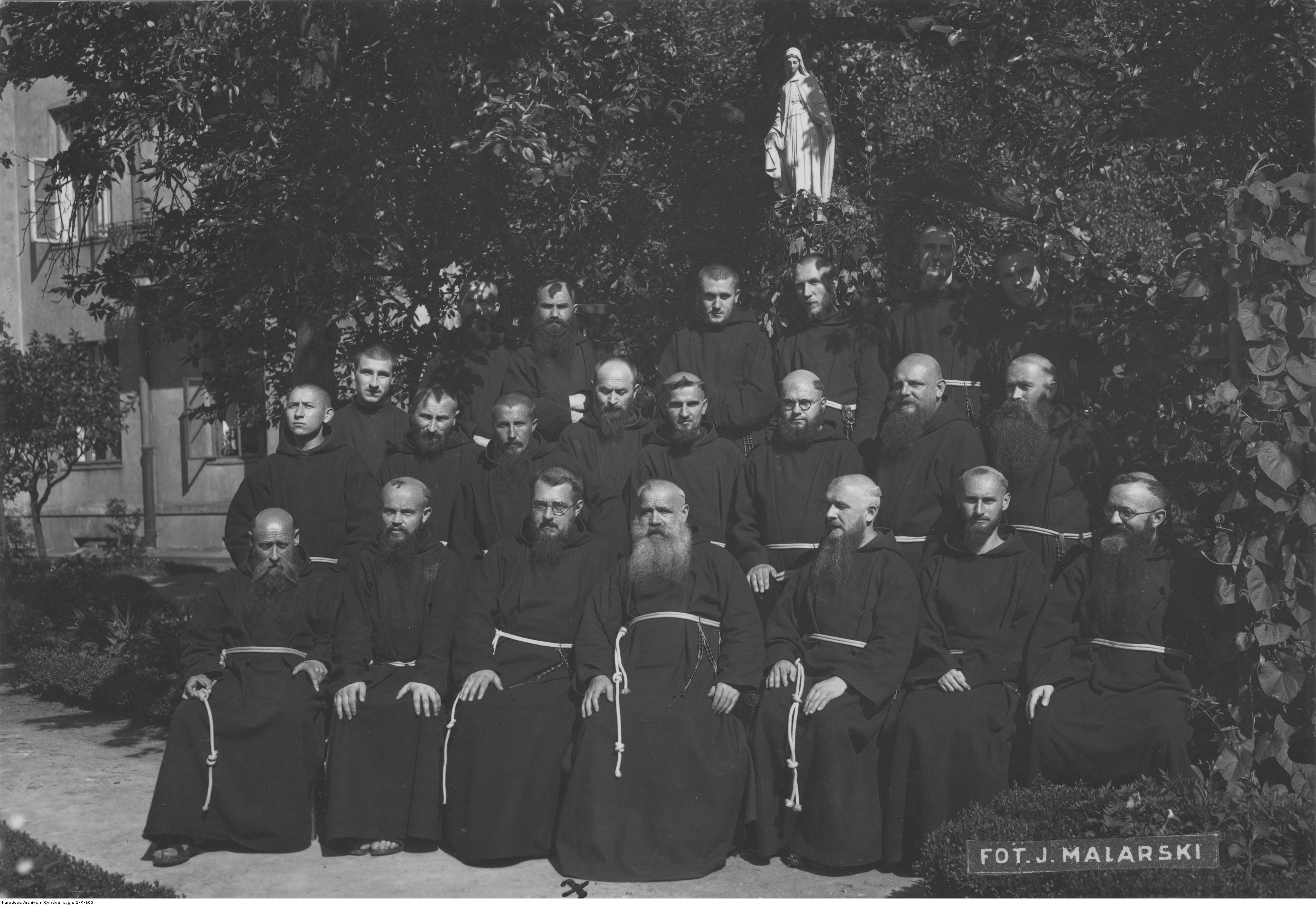 Generał zakonu wśród zakonników OO. Kapucynów z klasztoru w Warszawie. Drugi z prawej w srodkowym rzedzie br. Symforian Ducki.